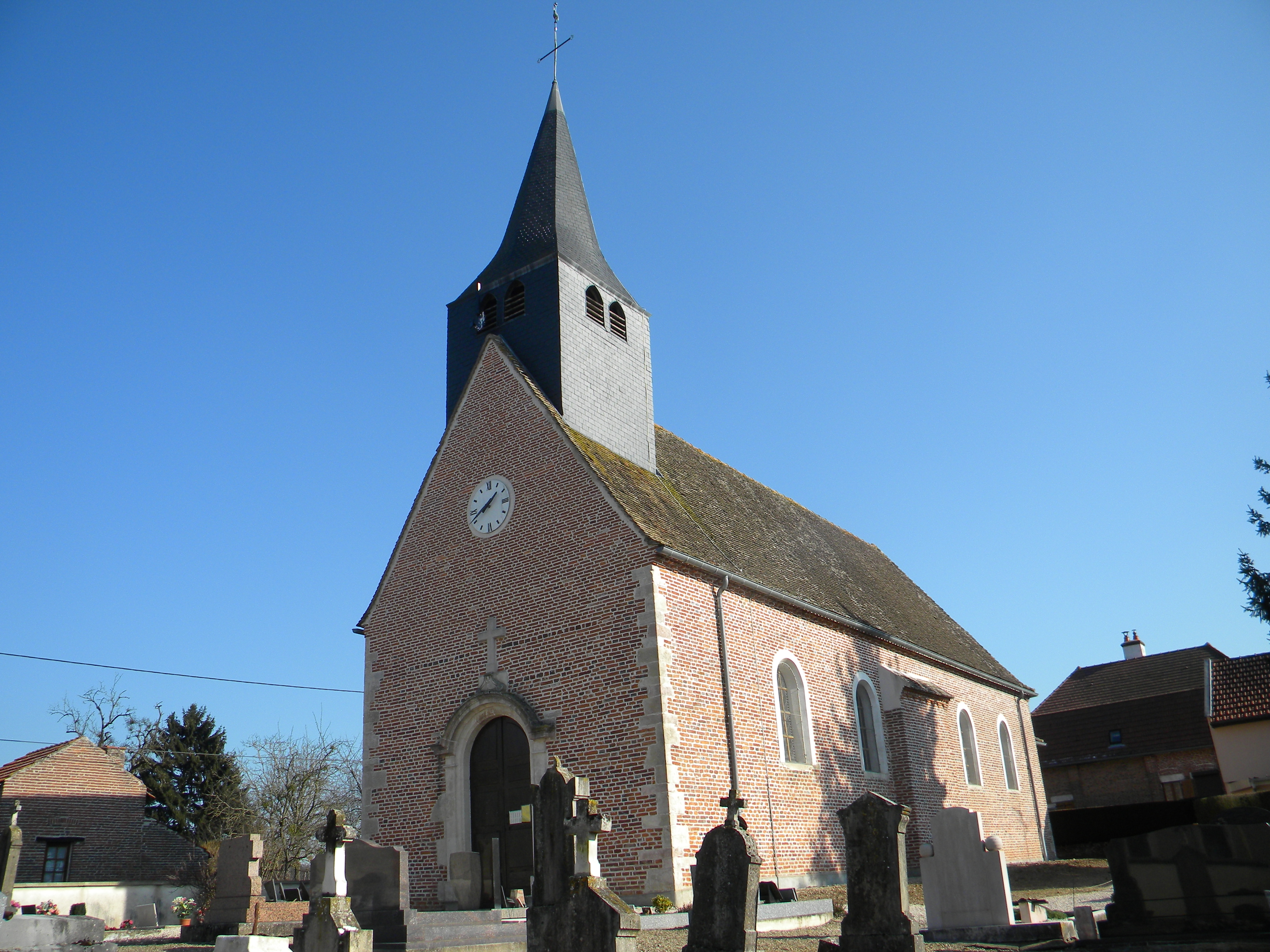 Eglise